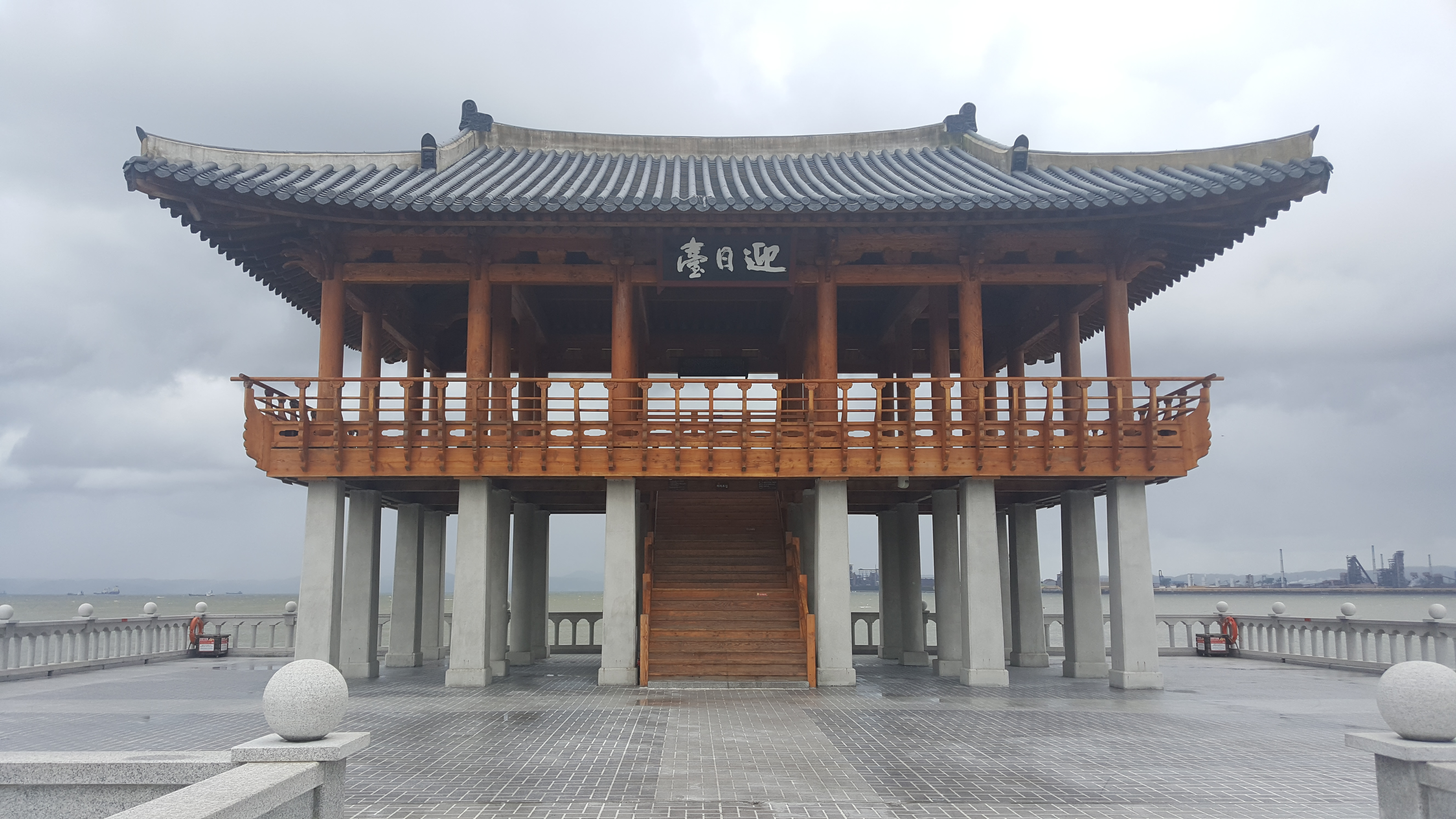 2016년 9월 포항 영일대해수욕장의 영일정